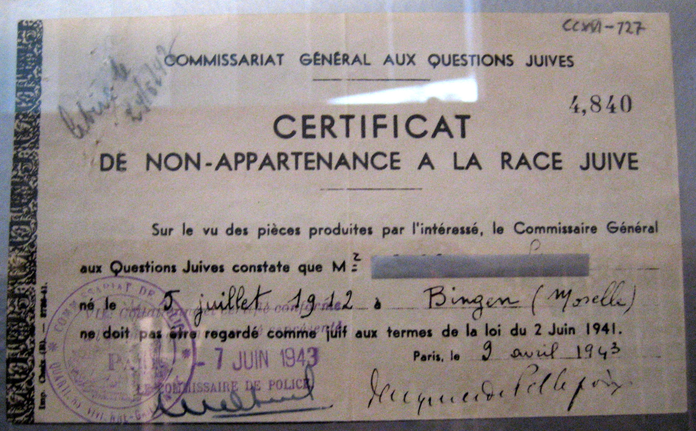 Certificate for non-Jews, Musée de la ville de Lausanne, Switzerland.